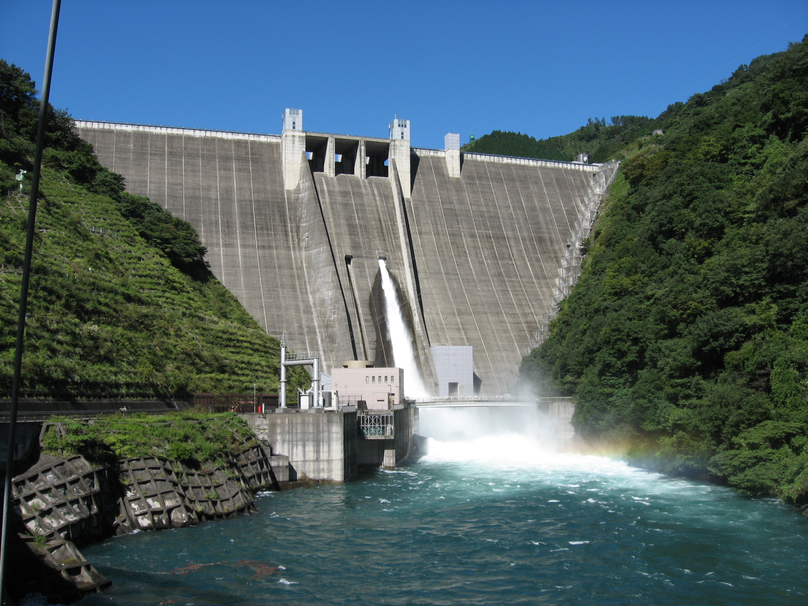 新石小屋橋から見た宮ヶ瀬ダム。通常の観光放流時は左右両方の導水管から放水されますが、このときは数日前の大雨で貯まった水の放流だった（観光放流ではなかった）ので片方からの放水となっています。